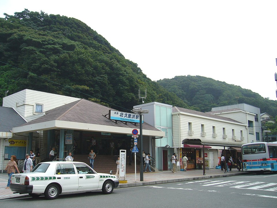 北久里浜駅 駅舎 2006年9月7日 Bakkai撮影